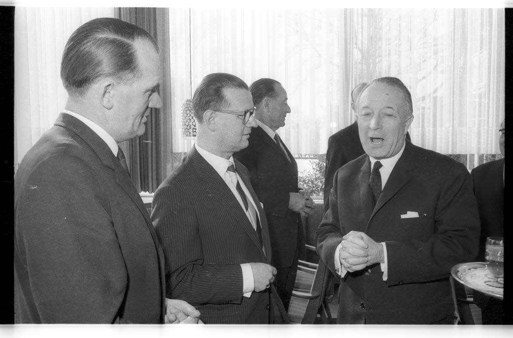 Empfang im Hotel Conti-Hansa im Schlossgarten 7. Im Bild v.l.n.r.: Staatsanwalt Heyck, Landesinnenminister Hartwig Schlegelberger., franz. Botschafter Francois Seydoux de Clausonne.